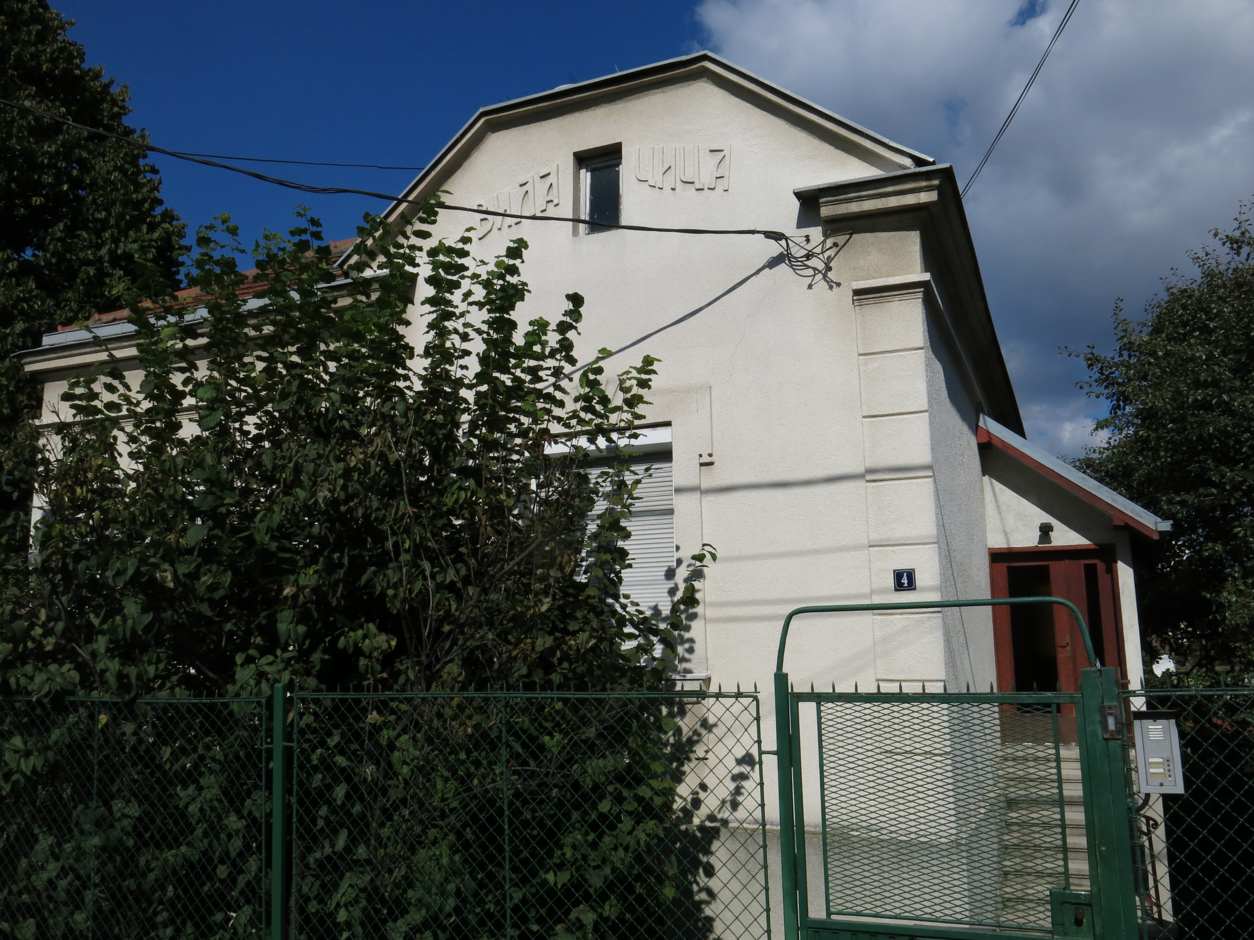 Заоставштина Драгомира Глишића